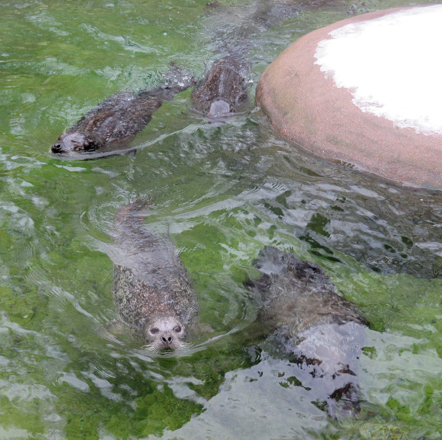 Fyra simmande knubbsälar (Phoca vitulina) i Slottsskogen i Göteborg, Västergötland, Västra götalands län, Sverige.